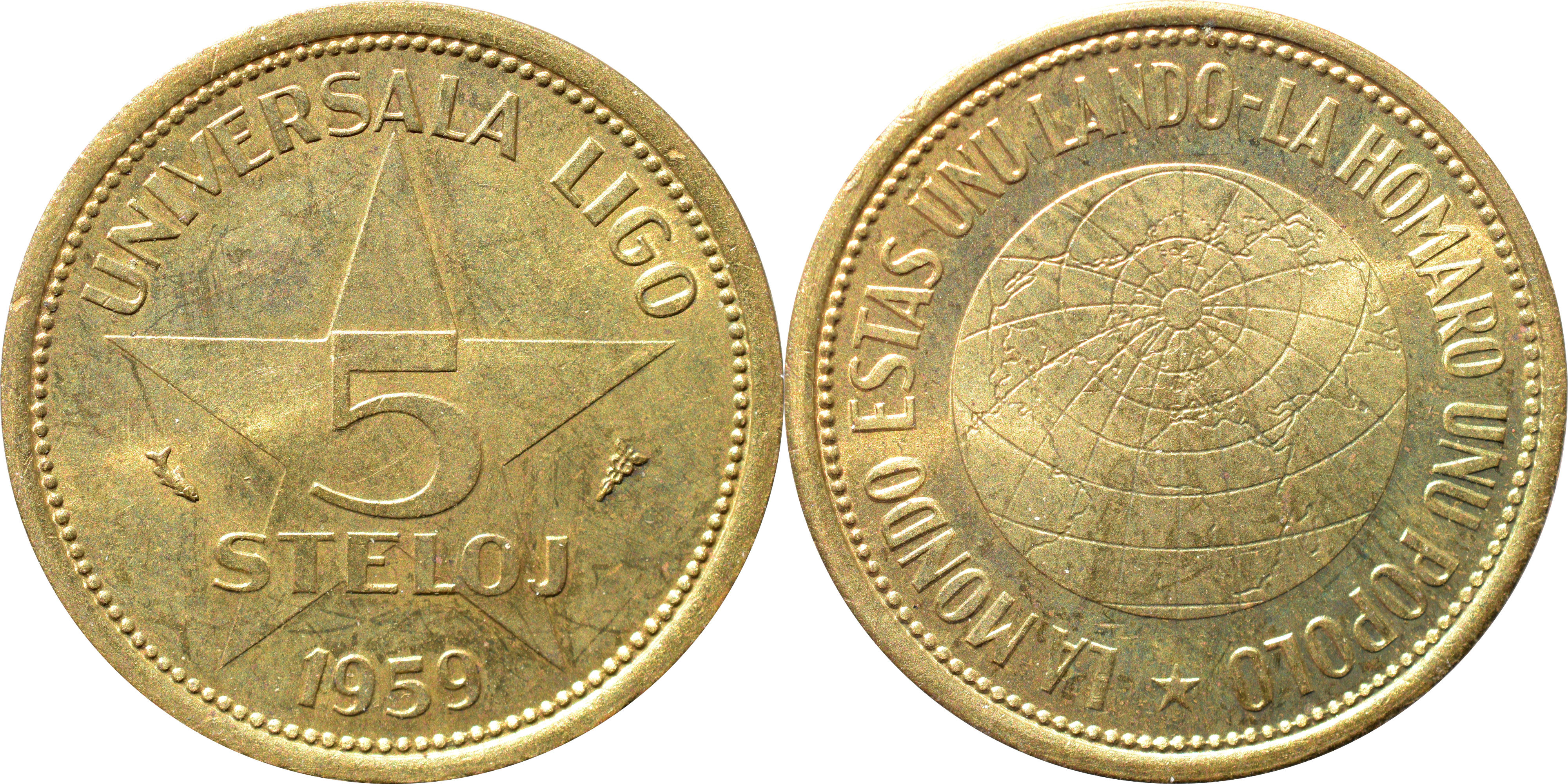 Monero de 5 steloj.